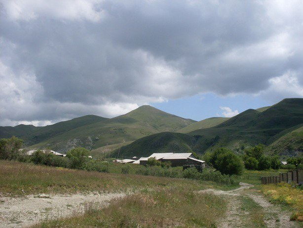 Гора Берд, так называют гору жители поселка Арпени. Ей около 2255м.